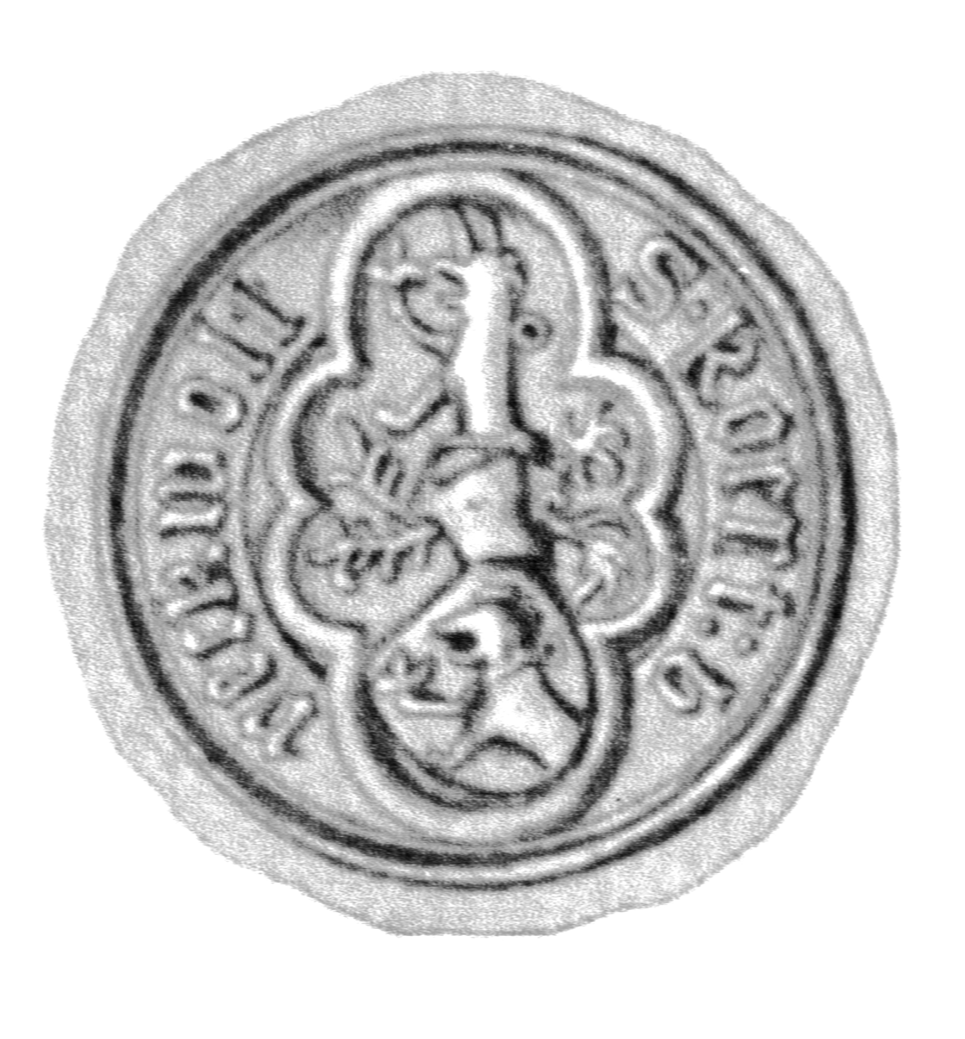 Siegel des Ratsmannes Koert Brekwolt. Das Siegel stammt aus der Zeit um 1442. Siehe Emil Ferdinand Fehling: Lübeckische Ratslinie, Nr. 441 (Konrad Brekewoldt, BM).